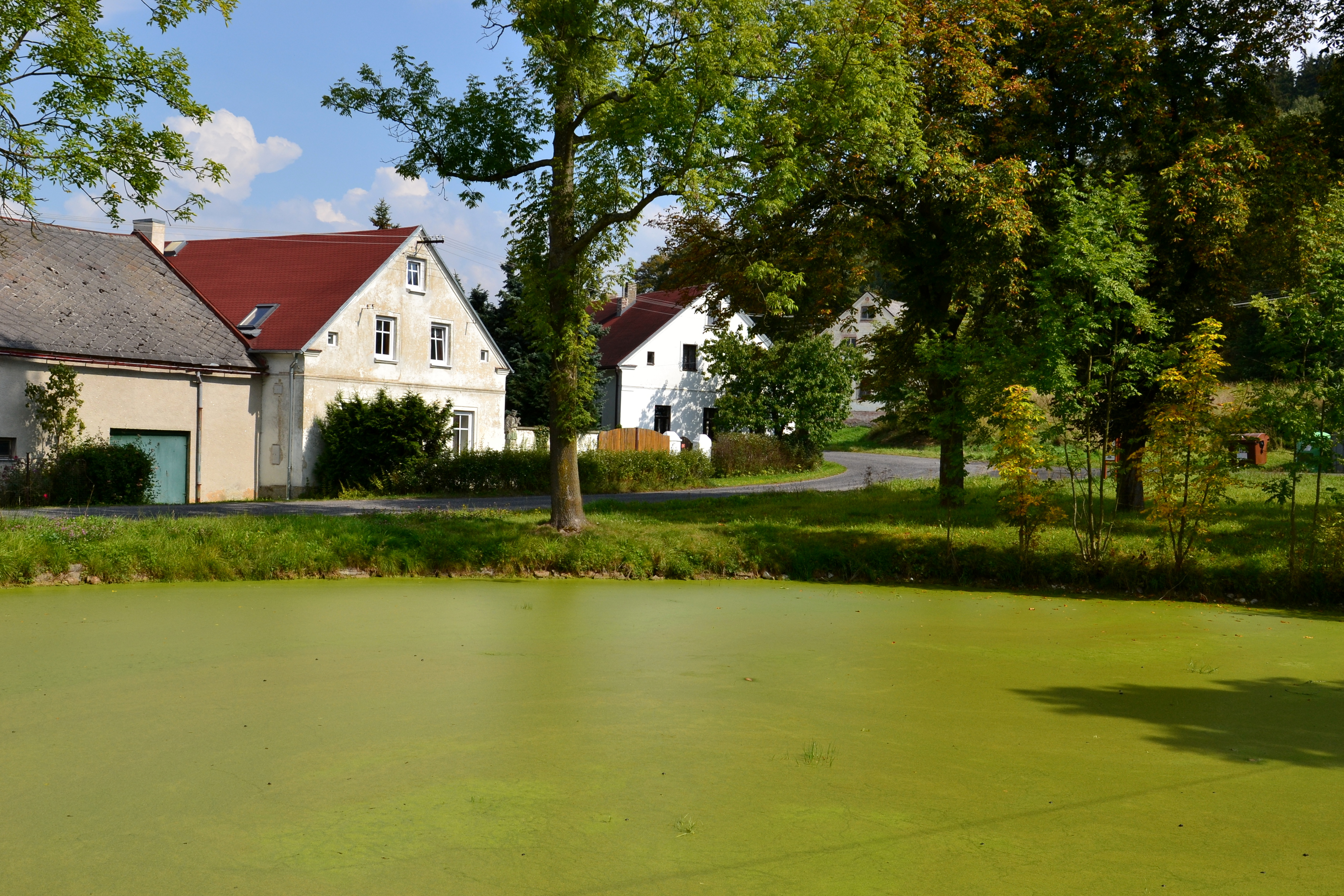 Návesní rybník v Prachometech